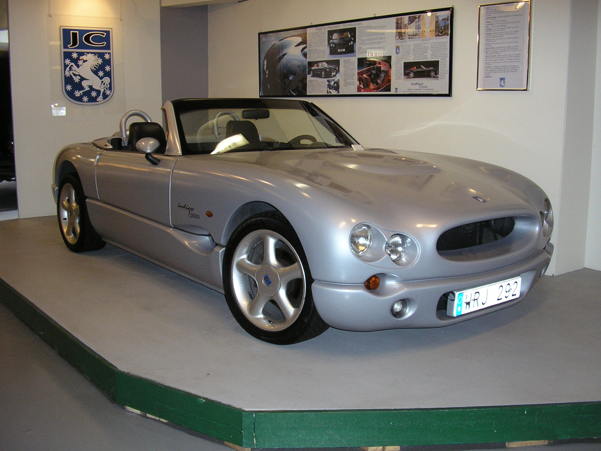 1998 JC Indigo 3000